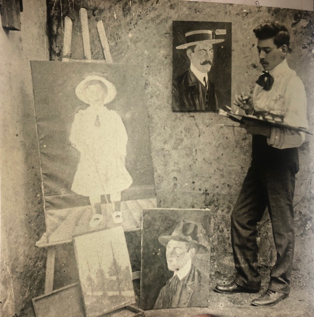 Santiago Stagnaro